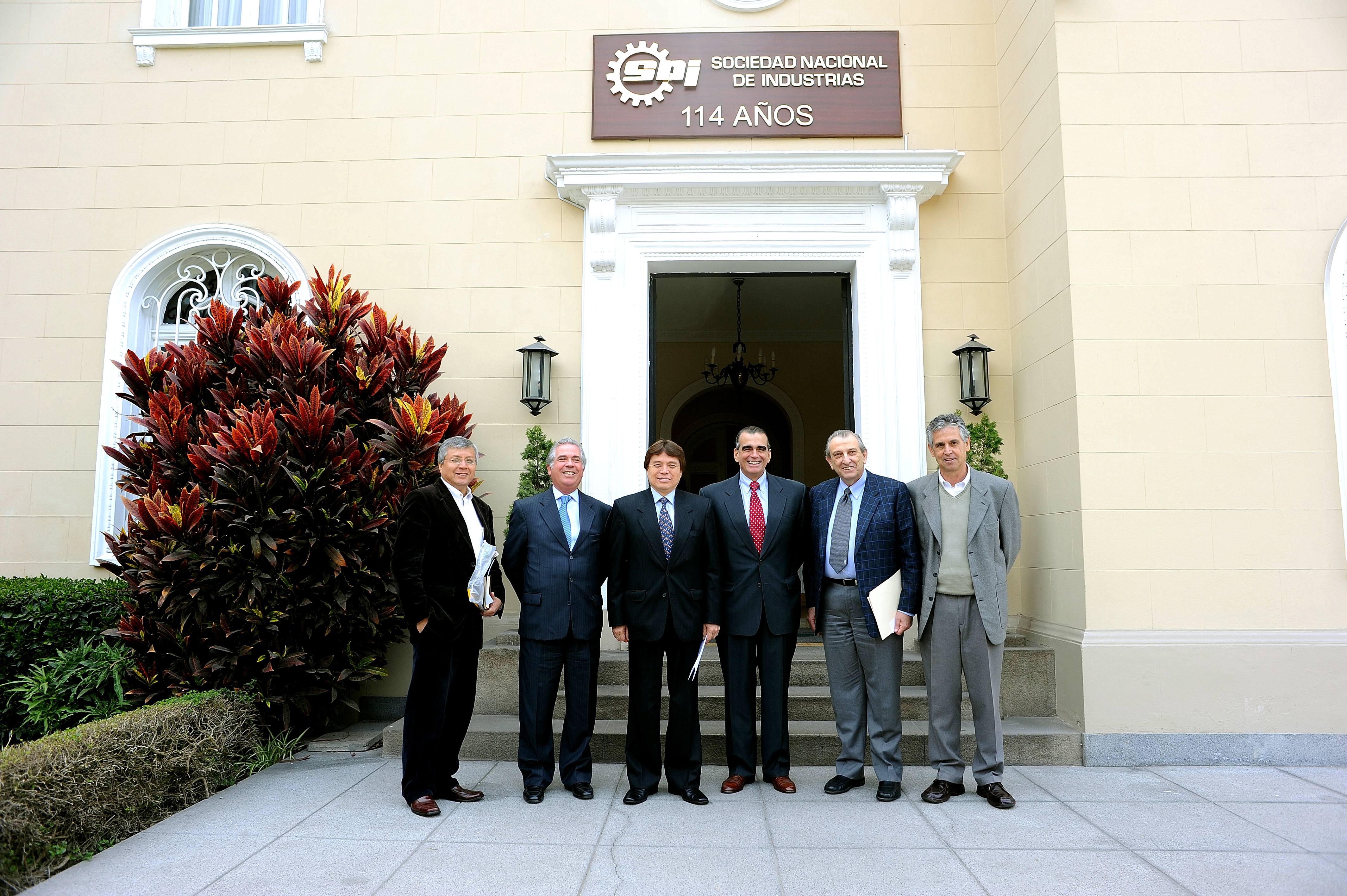 El presidente del Congreso, César Zumaeta Flores, sostuvo esta mañana una reunión de trabajo con la junta directiva de la Sociedad Nacional de Industrias (SNI), que preside Pedro Olaechea Alvarez Calderón. Fue en un aparte del foro sobre La inseguridad ciudadana y sus implicancias en los costos de las empresas realizado en la sede de esa entidad gremial.